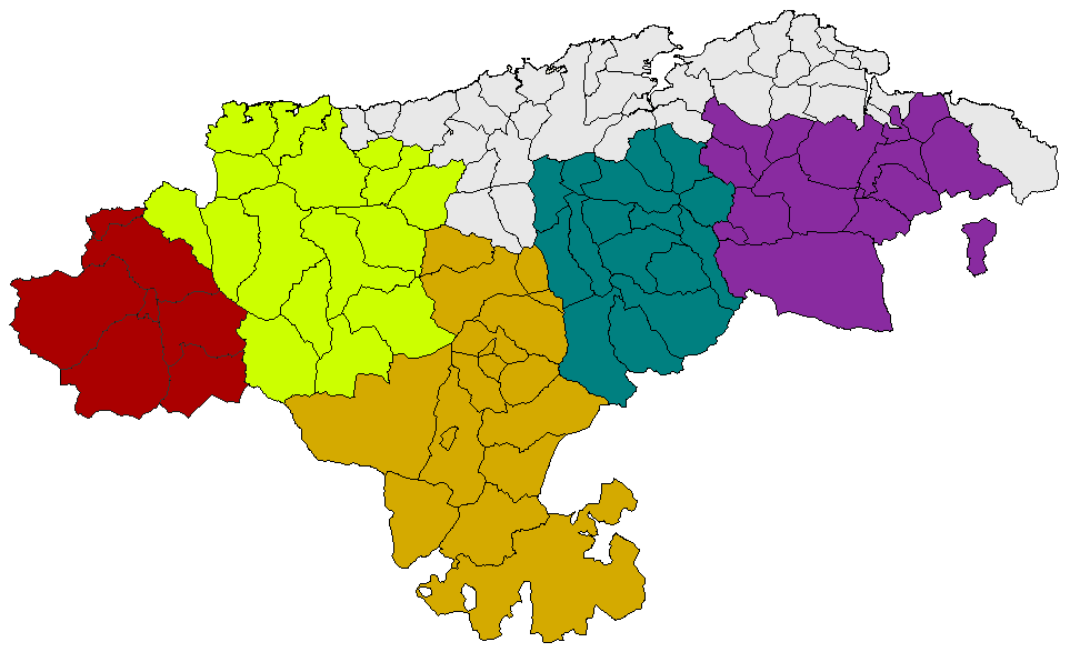 División territorial de la Red Cántabra de Desarrollo Rural. Liébana, Saja Nansa, Campoo-Los Valles, Valles Pasiegos, Asón-Agüera